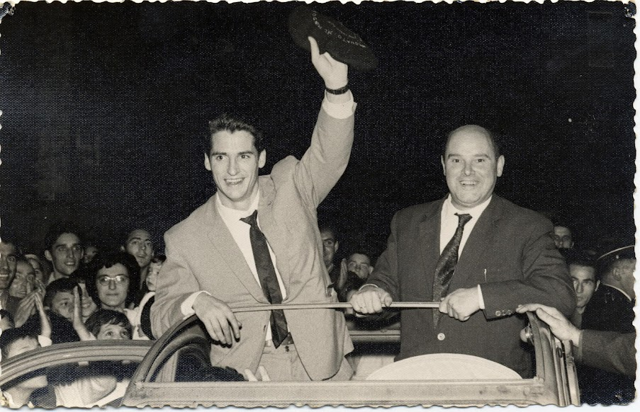 Homenaje en Elgoibar